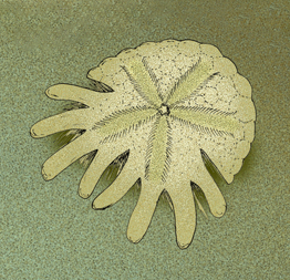 Rotula deciesdigitatus